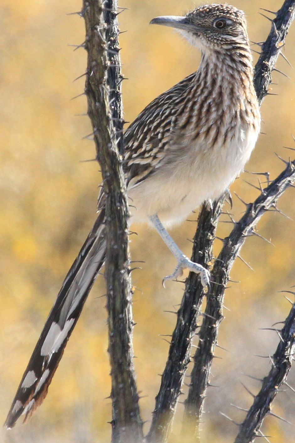 Correcaminos en el Rancho Guimbalete de Sierra Mojada Coahuila, México